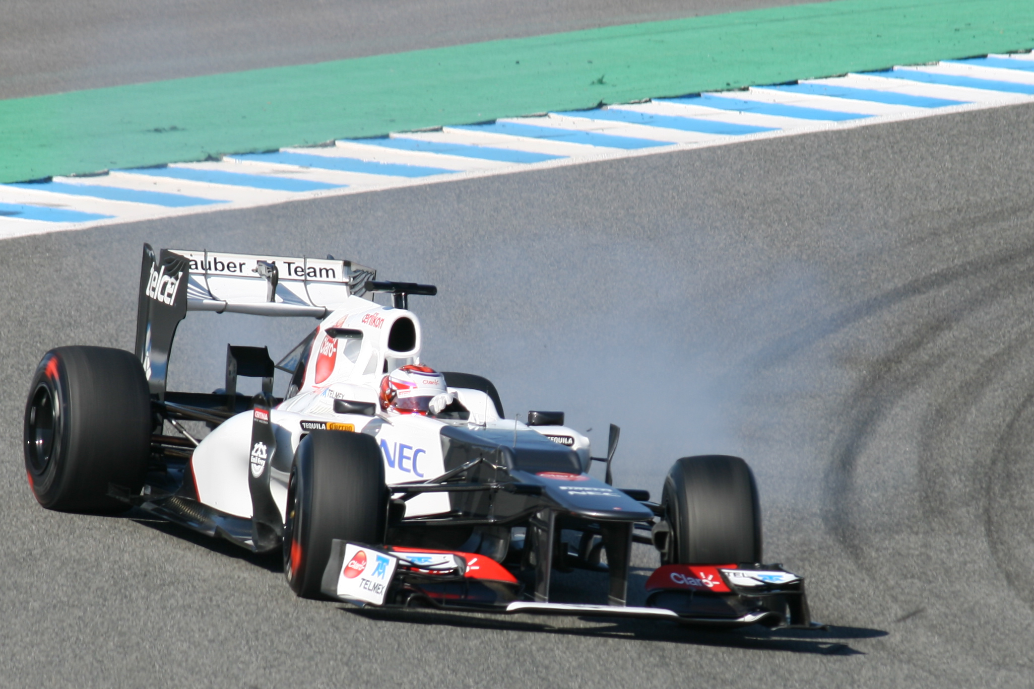 Kobayashi drift